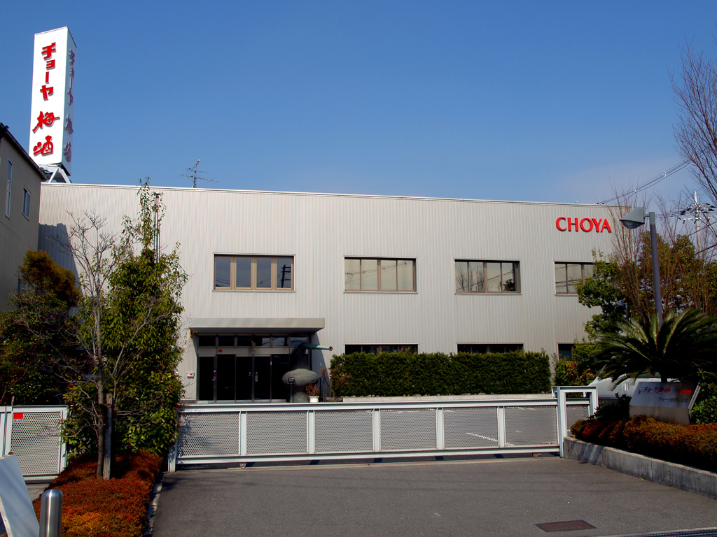 チョーヤ梅酒株式会社 本社 所在地：大阪府羽曳野市駒ヶ谷160番地1